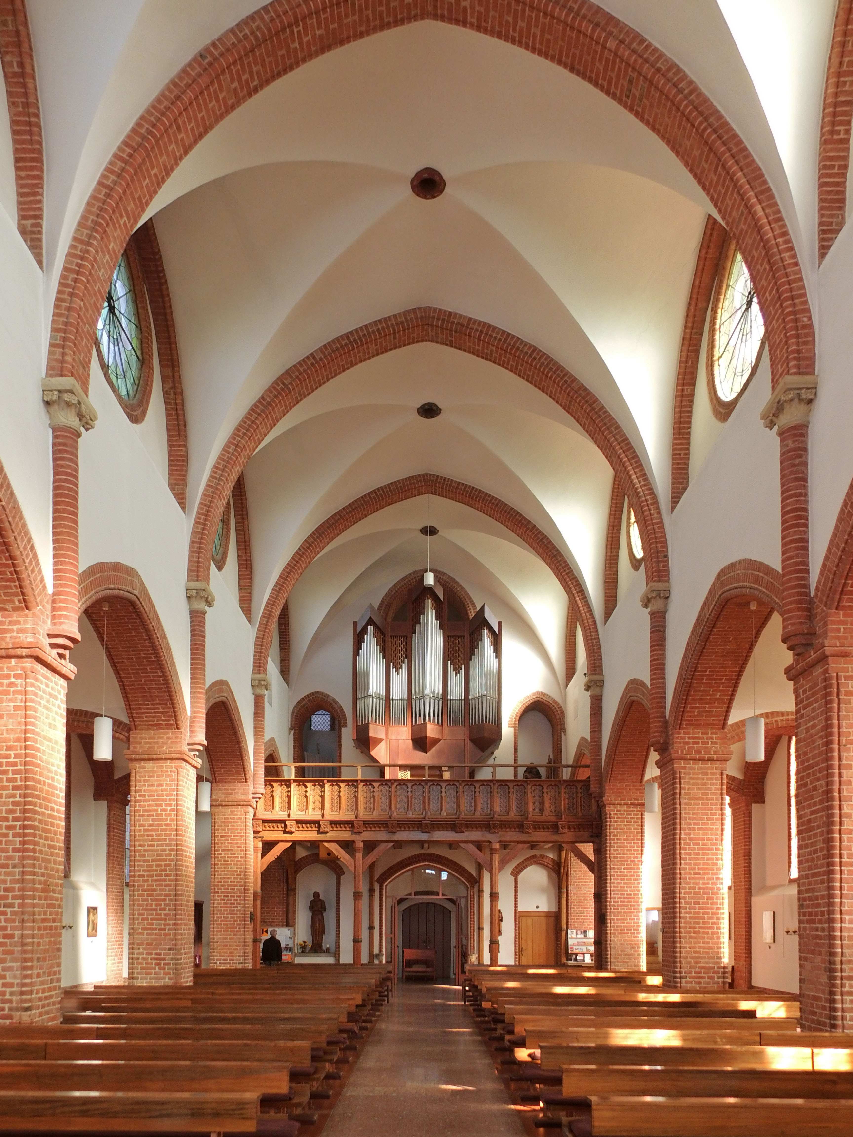 Katholische St.-Marien-Kirche in Oschersleben, Blick zur Orgelempore.